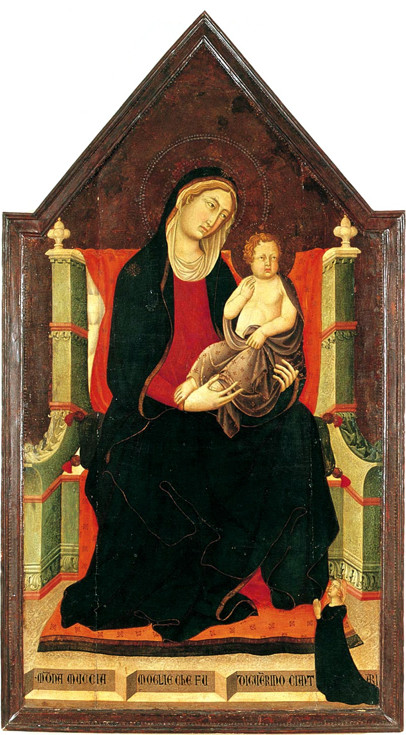 Niccolo e Francesco di Segna, Madonna in trono con bambino e donatrice, Lucignano, Museo